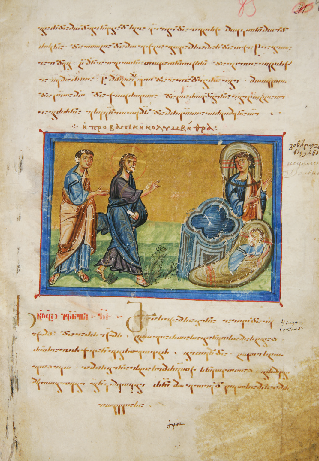 მცირე სვინაქსარი